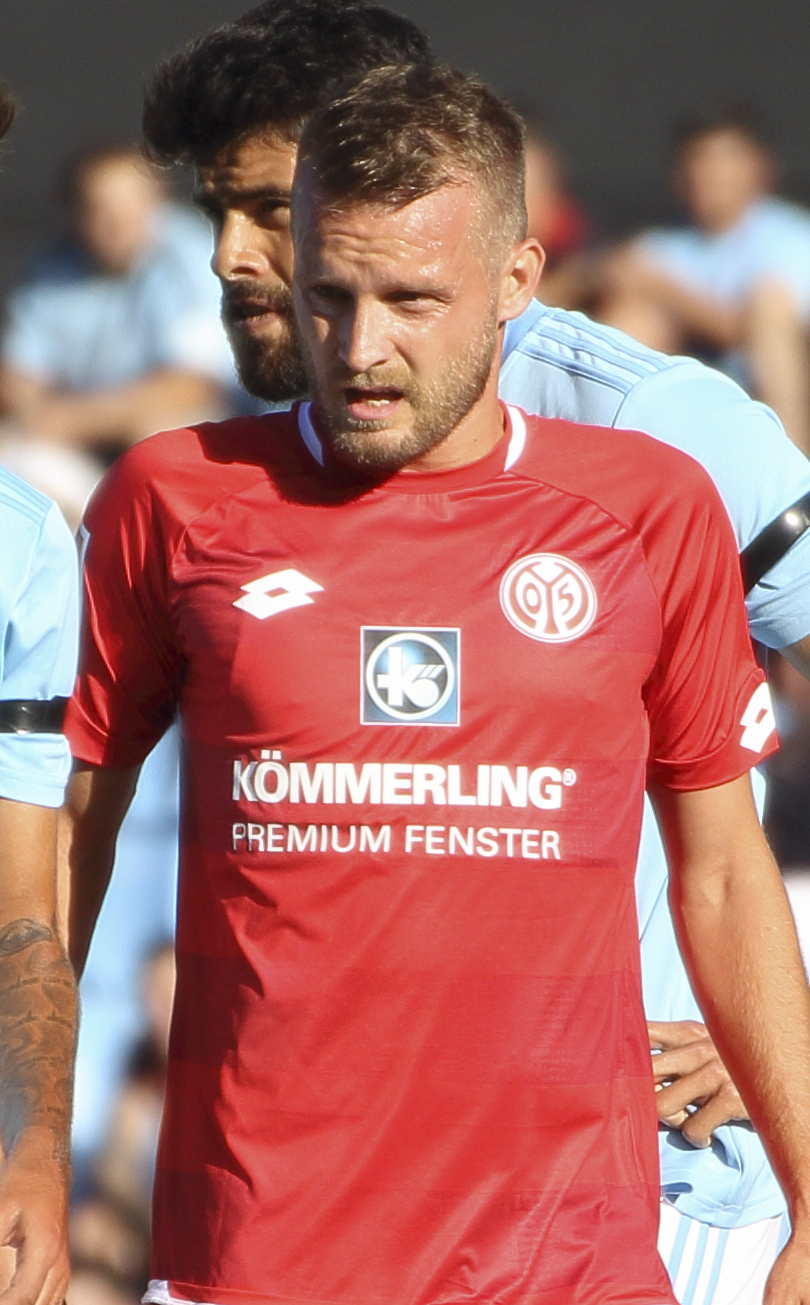 Presentación RC Celta - Temporada 18/19